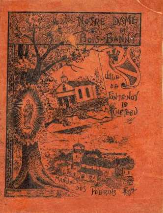 Manuel des pelerins,Notre Dam du bois Banny , ville de Fontenpy-le-Château, Vosges.1909